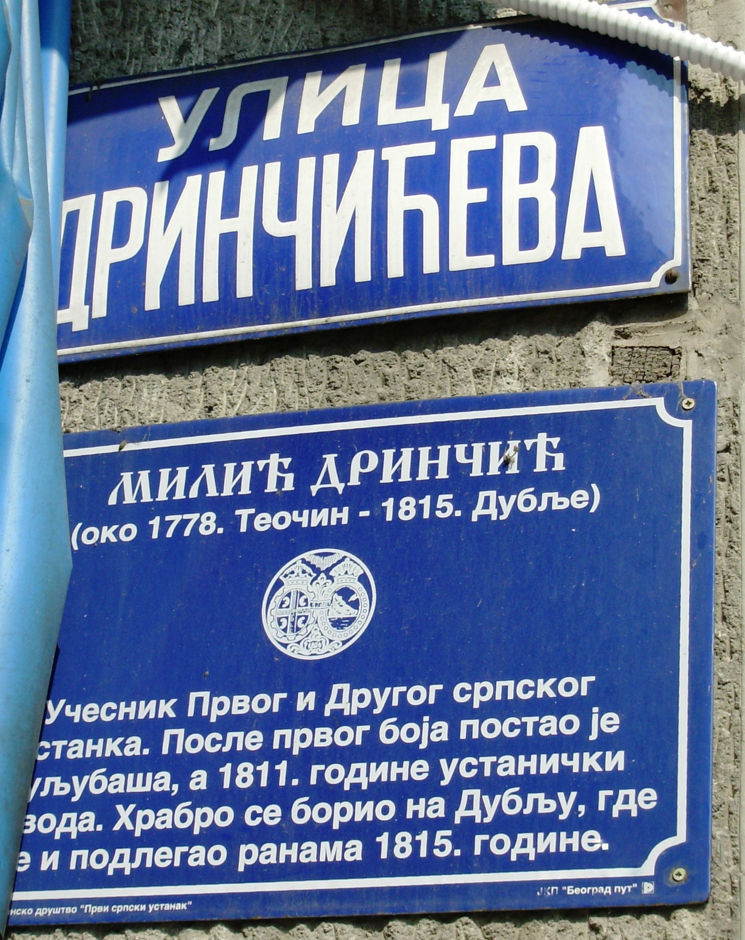 Drinčićeva ulica u Beogradu, u blizini Bajlonove pijace. Slikao Goldfinger.